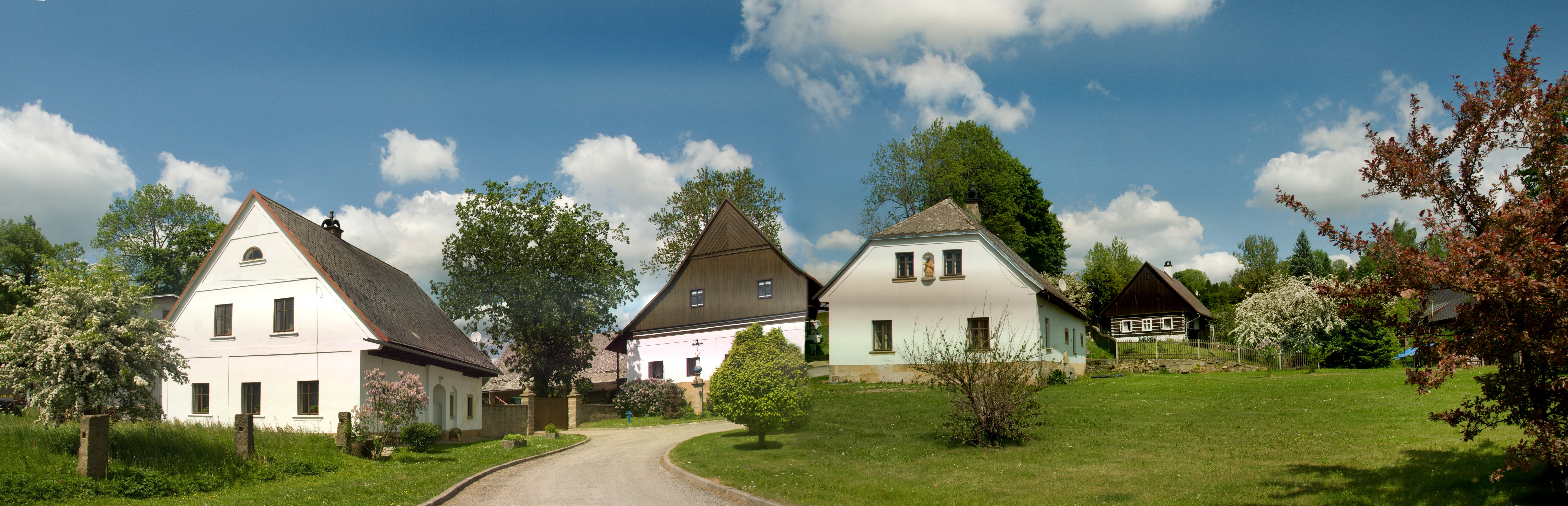 Šolcovna, Suchý Důl 1